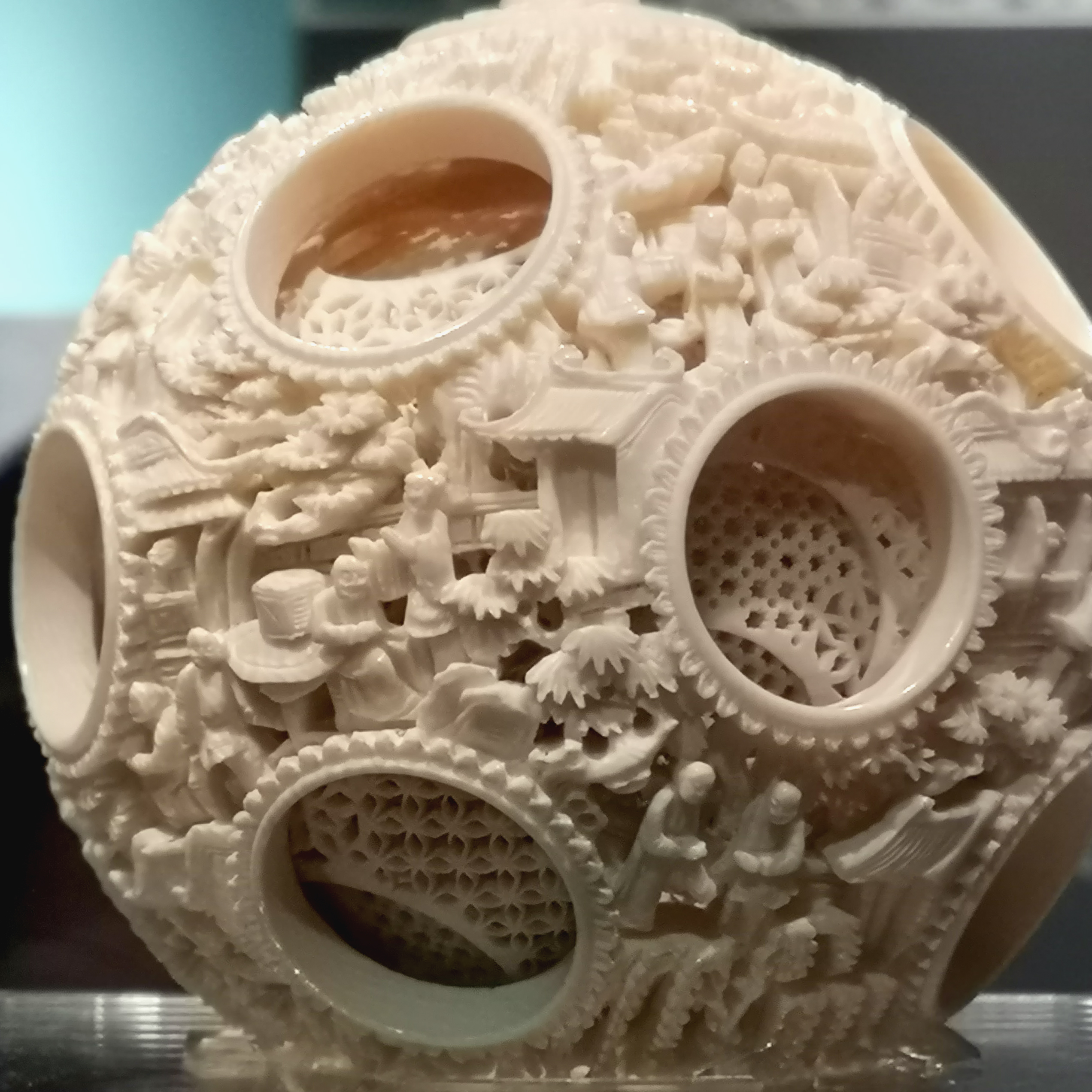 中華民国の國立故宮博物院に収蔵されている、雕象牙透花人物套球 象牙から削り出され、17層の球体からなる